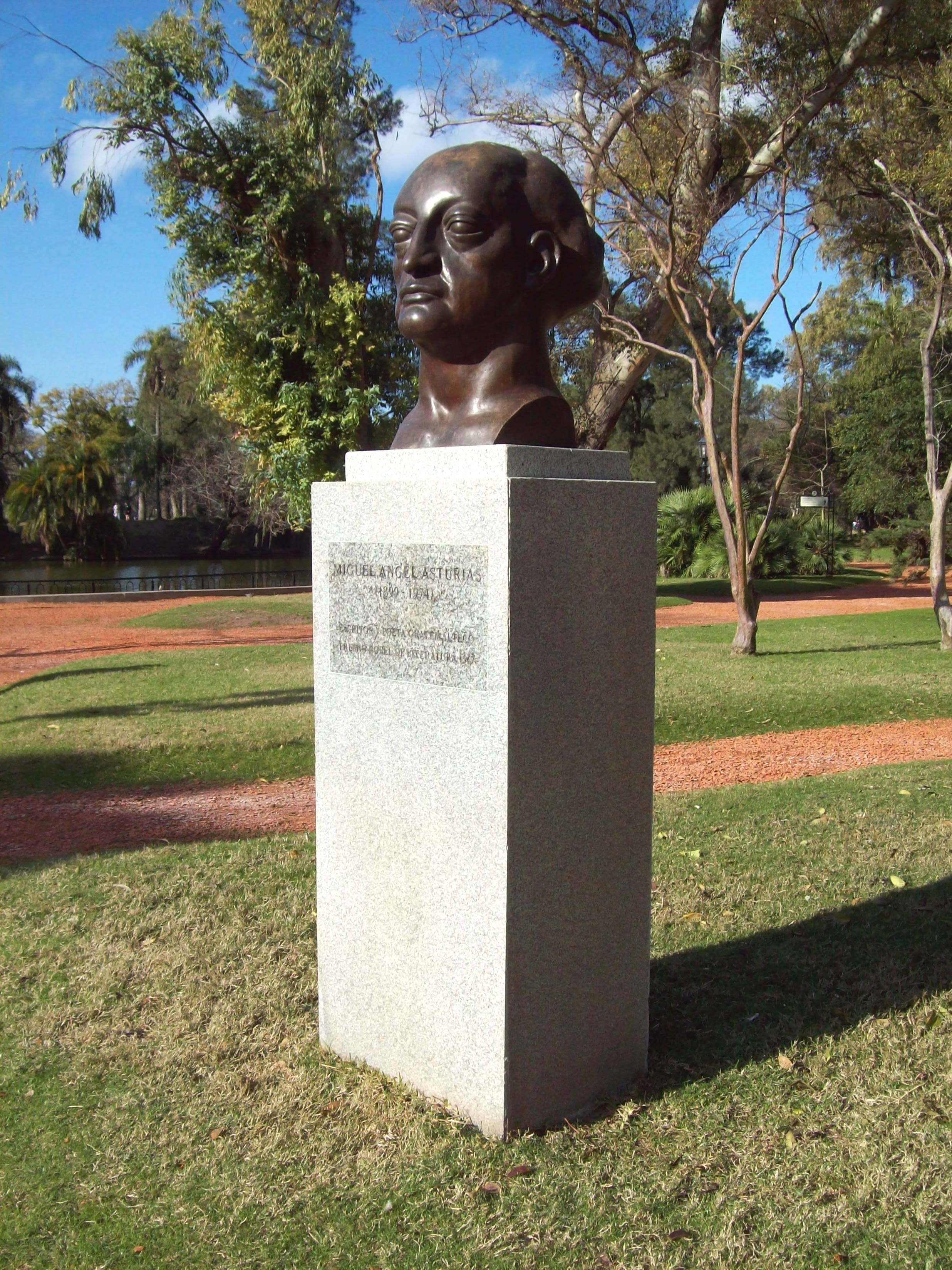 Monumento al escritor y diplomático guatemalteco Miguel Ángel Asturias en los Parques de Palermo.